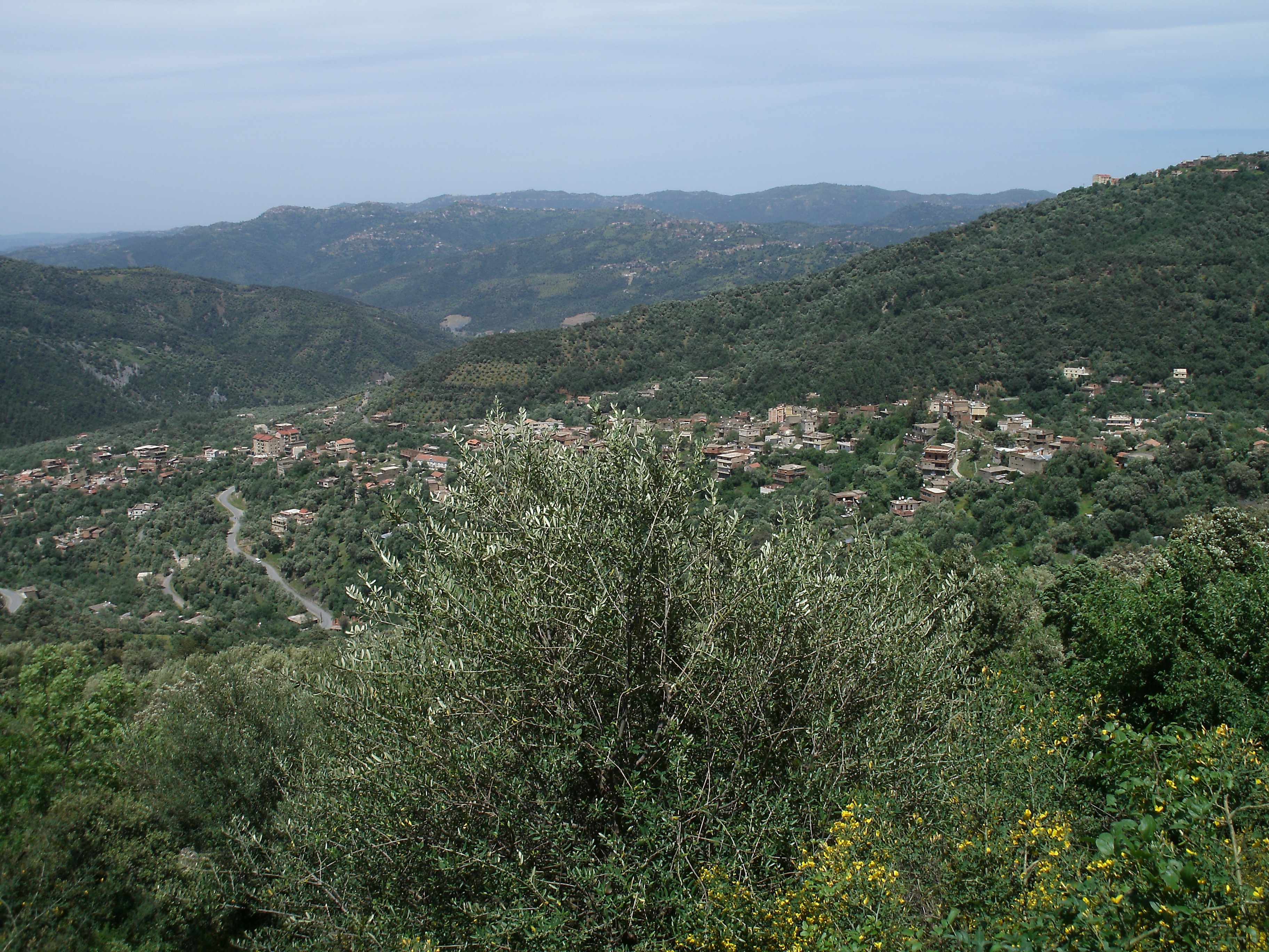 Aït Boumehdi en Grande Kabylie